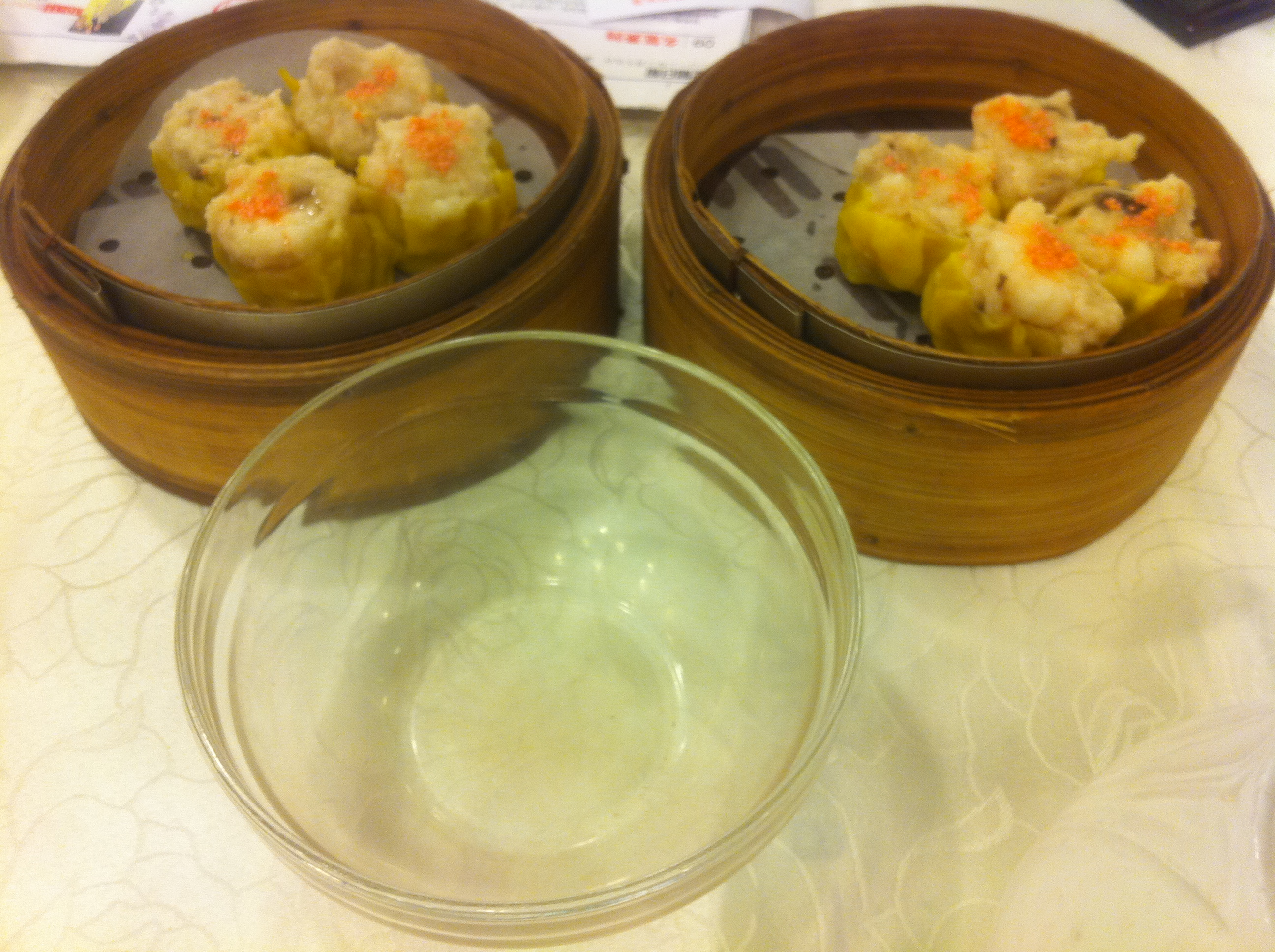 中文（香港）: 香港 德輔道中267-275號 龍記大廈zh:金鑽海鮮皇宮 酒家